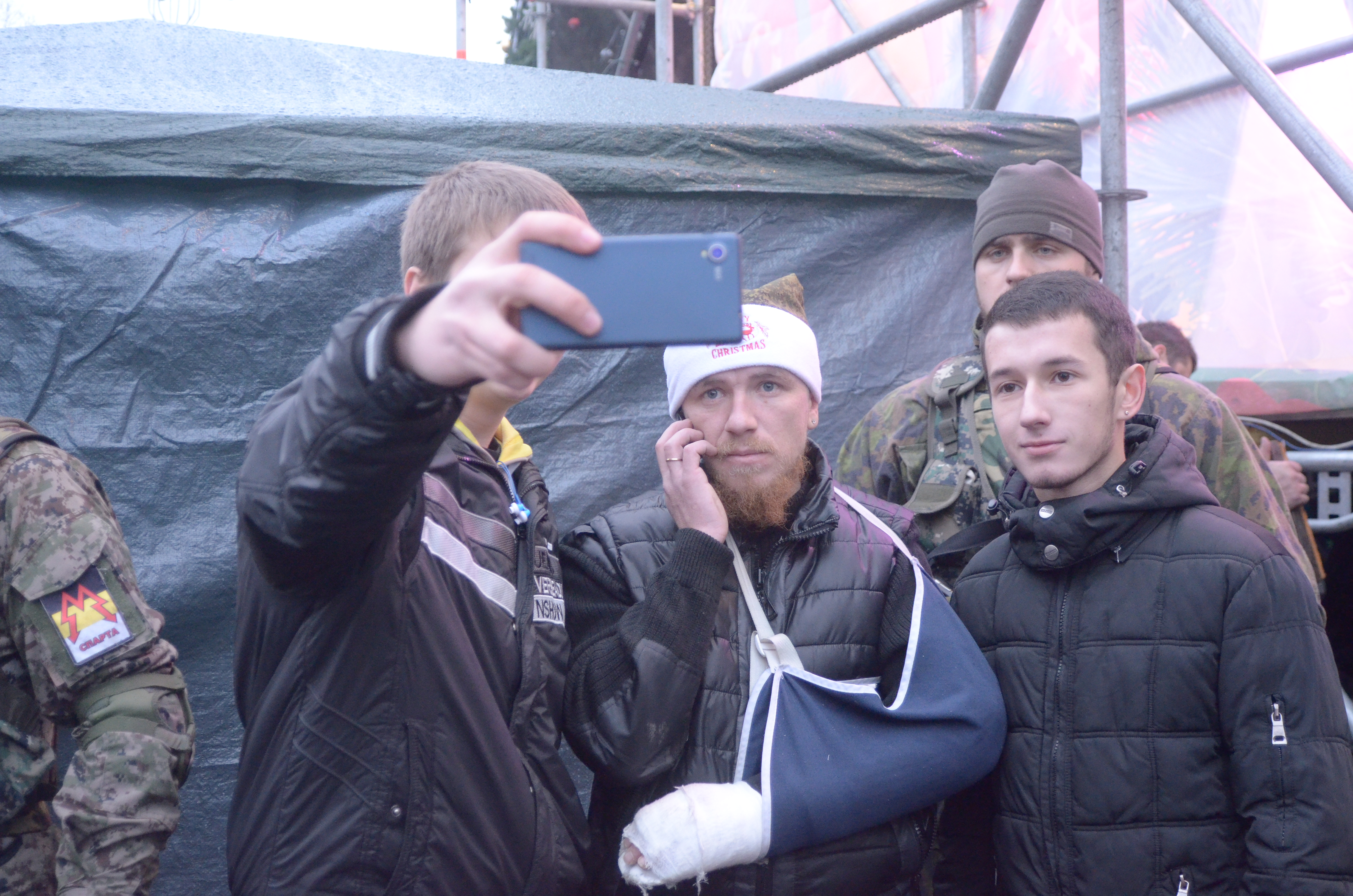 Открытие новогодней ёлки в Донецке